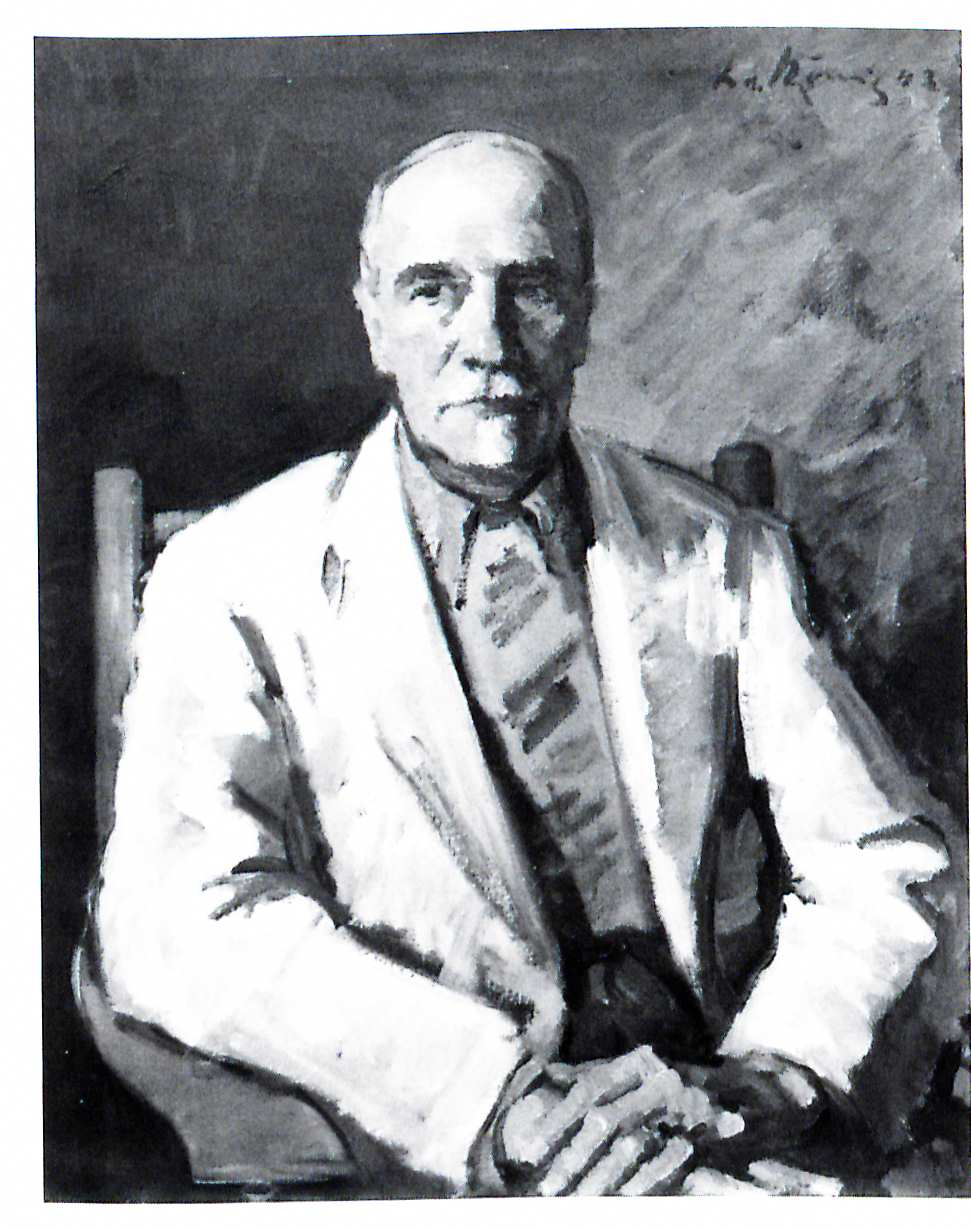 Leo von König Emil Waldmann 1943. Öl auf Leinwand, 95 × 75 cm. Farbfoto auch bei AKG